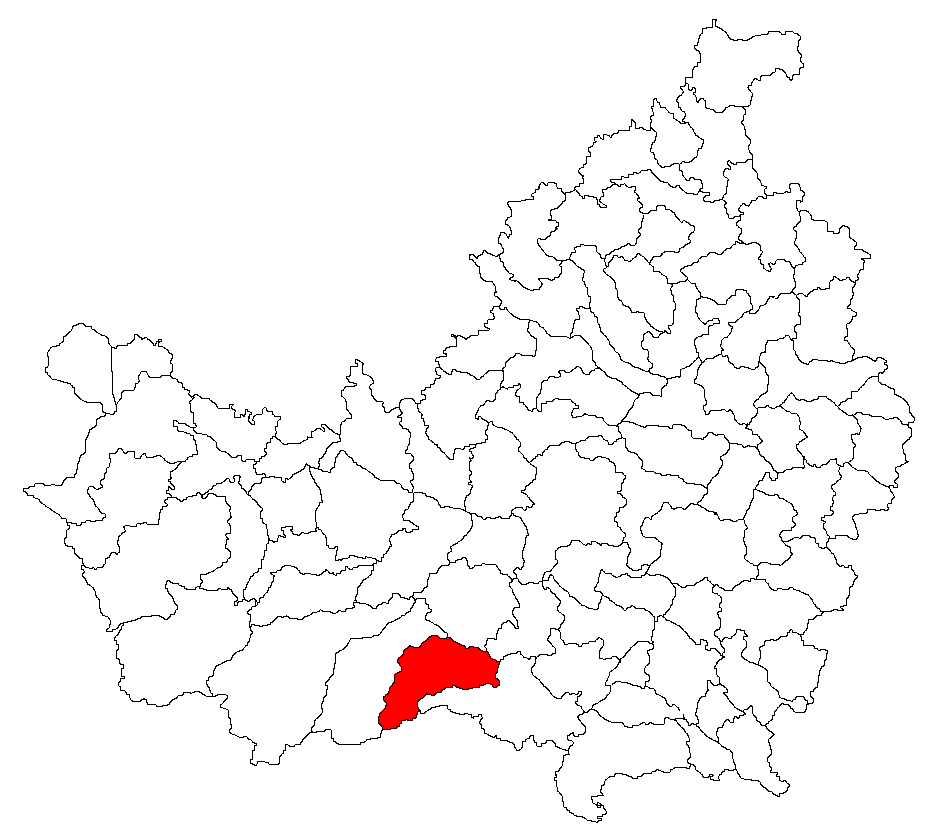 Comuna Baisoara, judeţul Cluj